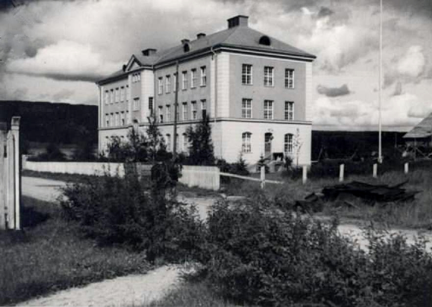 Garnisionssjukhuset i Sollefteå